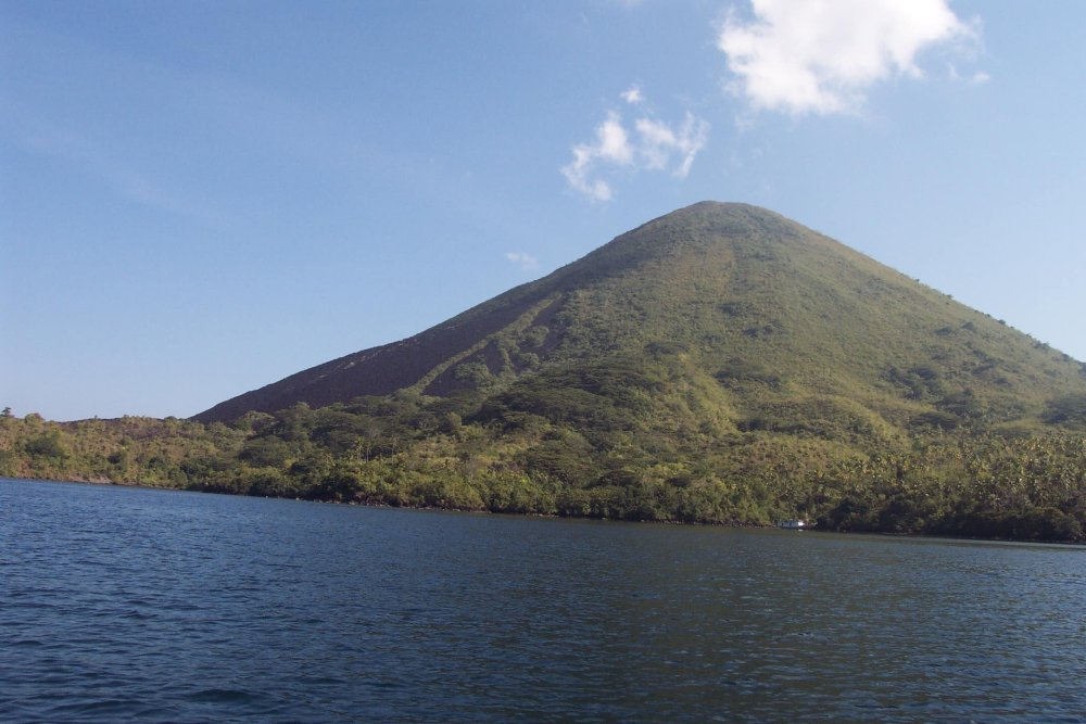 BandaVolcano